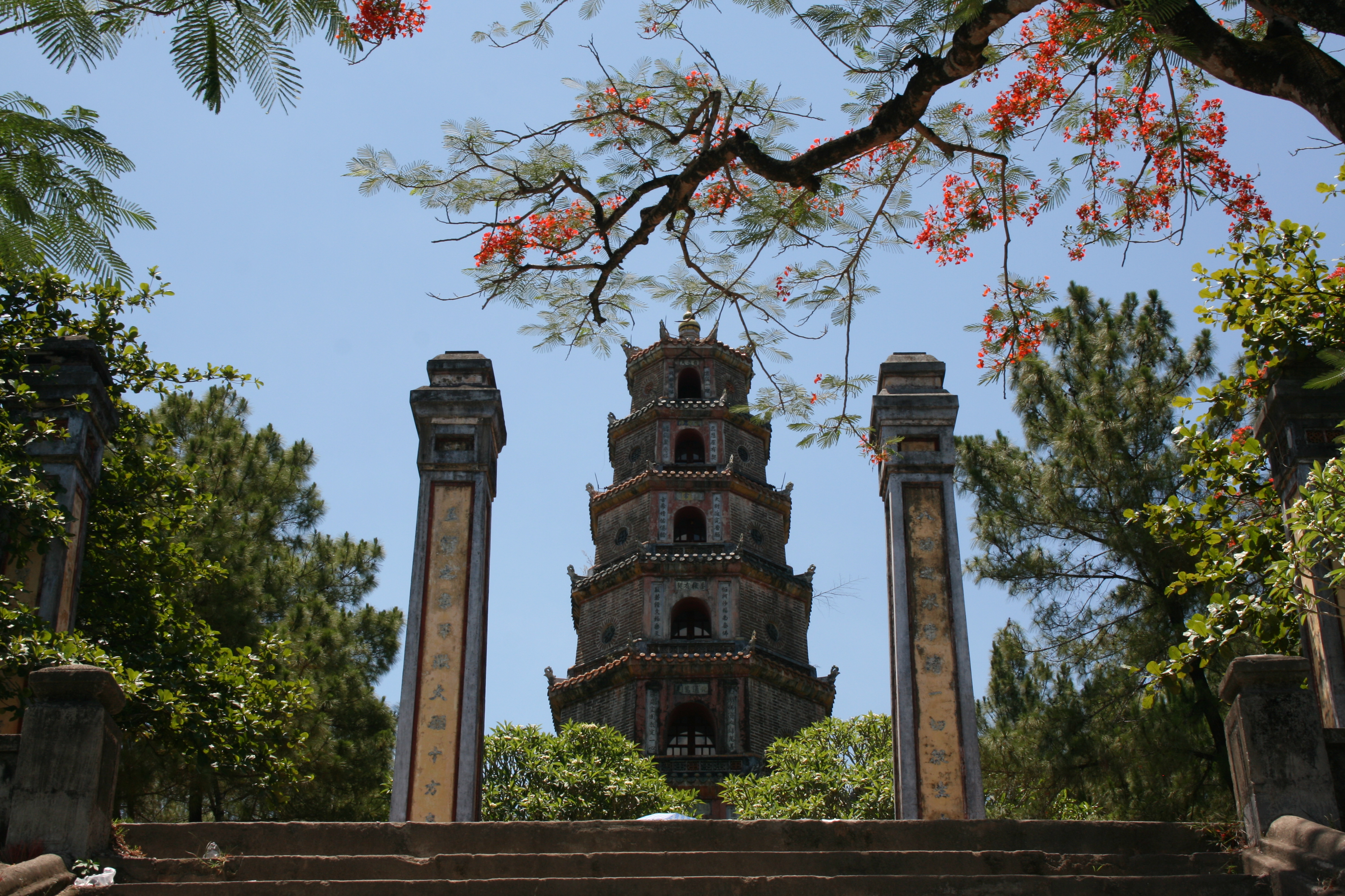 Thien Mu-Pagode in Hue